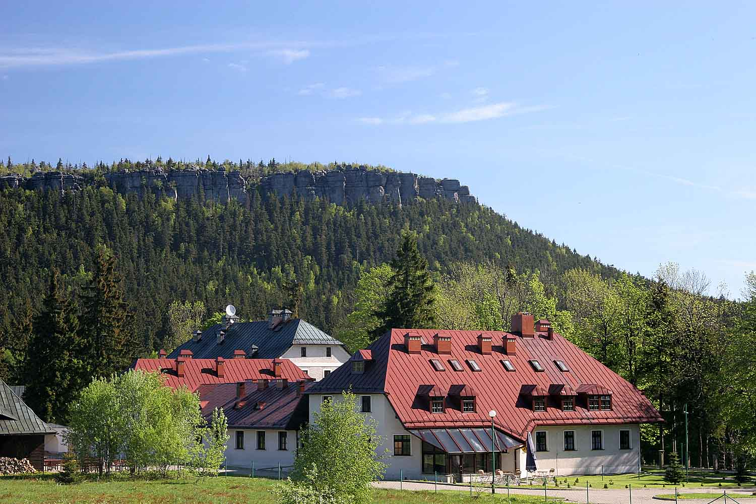 Vyhlídkové terasy na Velké Hejšovině od Karłowa